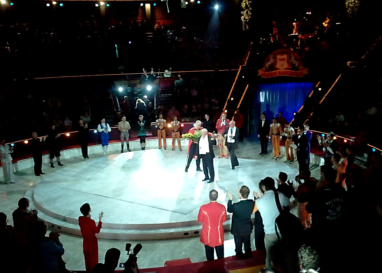 Budapesti Nemzetközi Cirkuszfesztivál. Kristóf István búcsúja. Fővárosi Nagycirkusz.